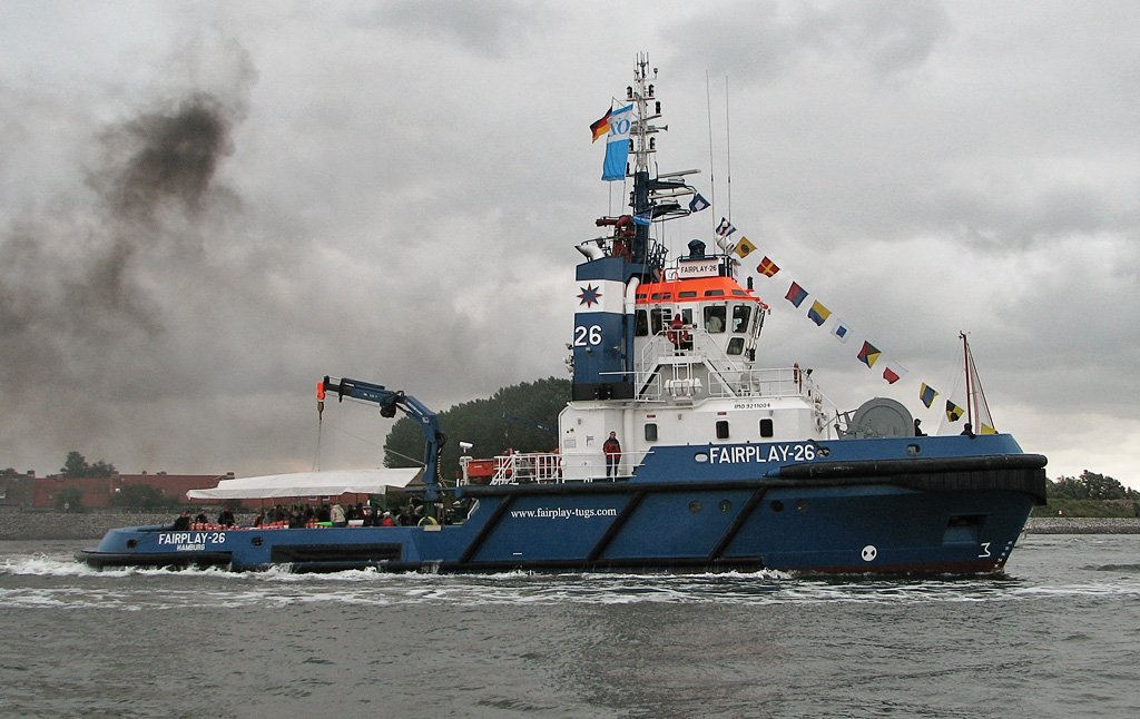 Schlepper "Fairplay 26" IMO Number: 9211004 MMSI Number: 211330380 Callsign: DIGU Length: 36 m Beam: 11 m